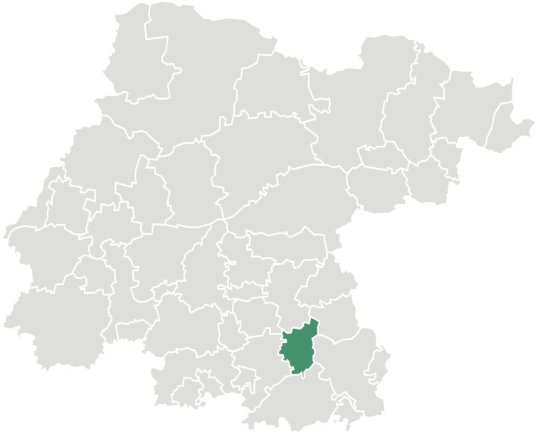 Mapa del municipio de Tarimoro en el estado mexicano de Guanajuato